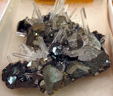 Fotografía de Pablo Alberto Salguero Quiles